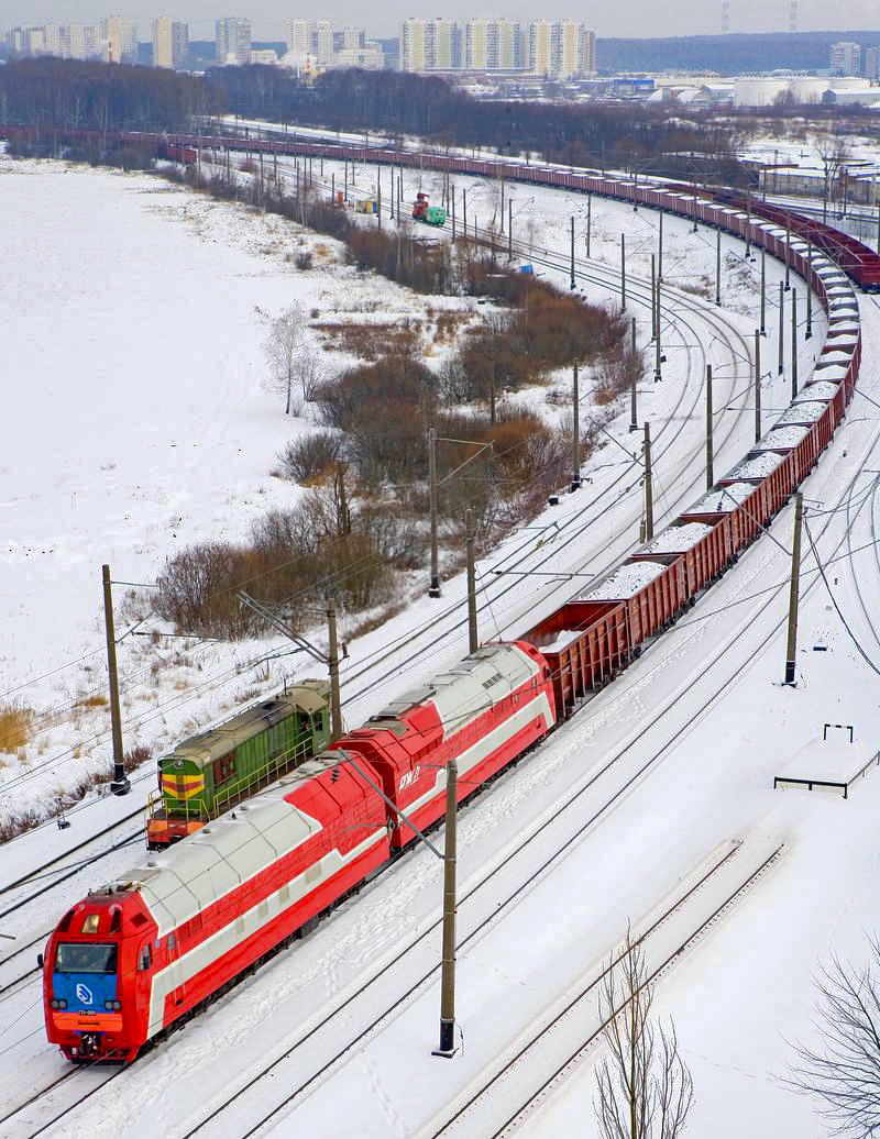 Газотурбовоз ГТ1-001 с грузовым поездом и тепловоз ЧМЭ3 на кольце ВНИИЖТ в Щербинке, вид сверху